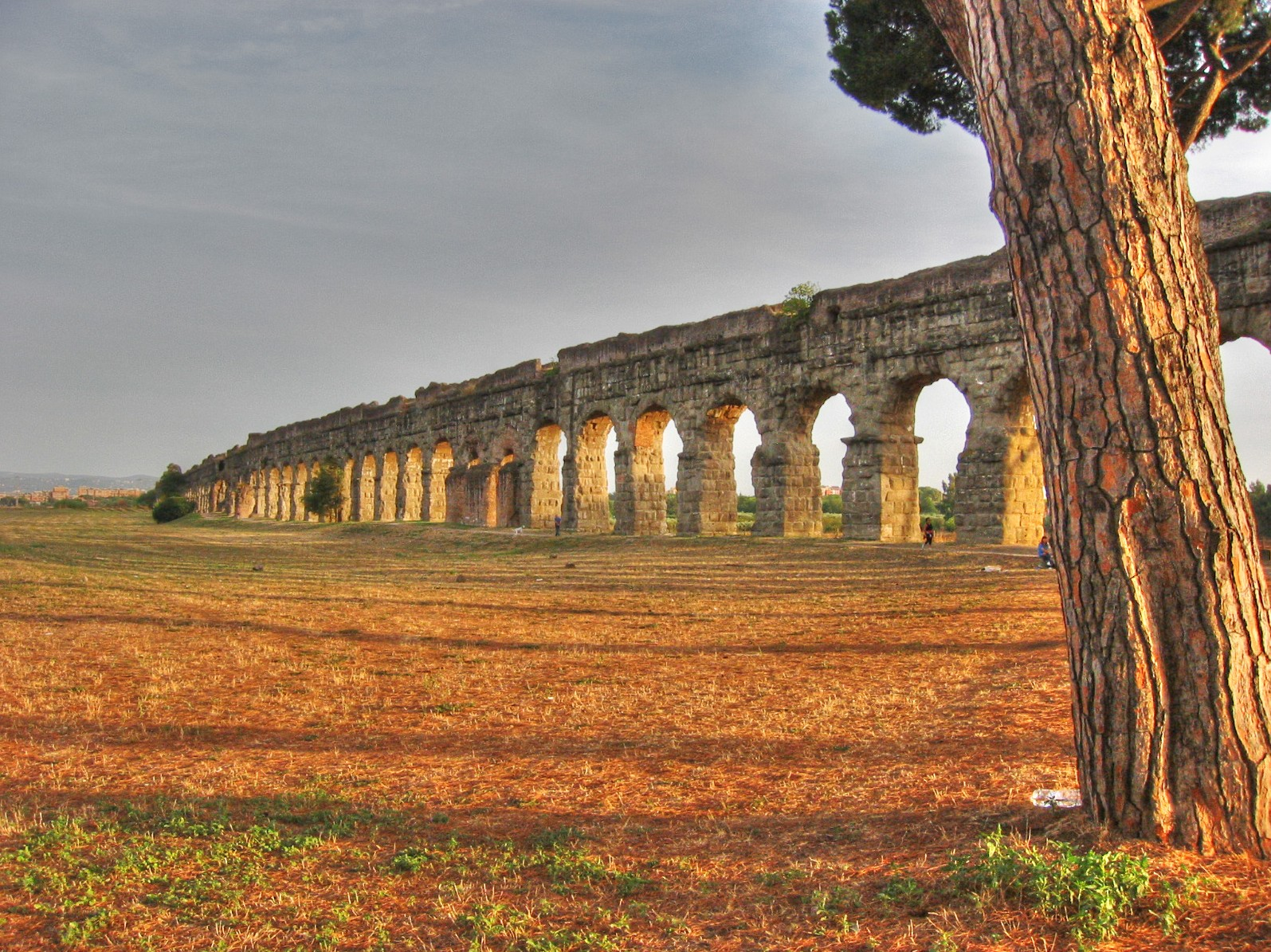 Roma, Lazio, ItaliaAcquedotti